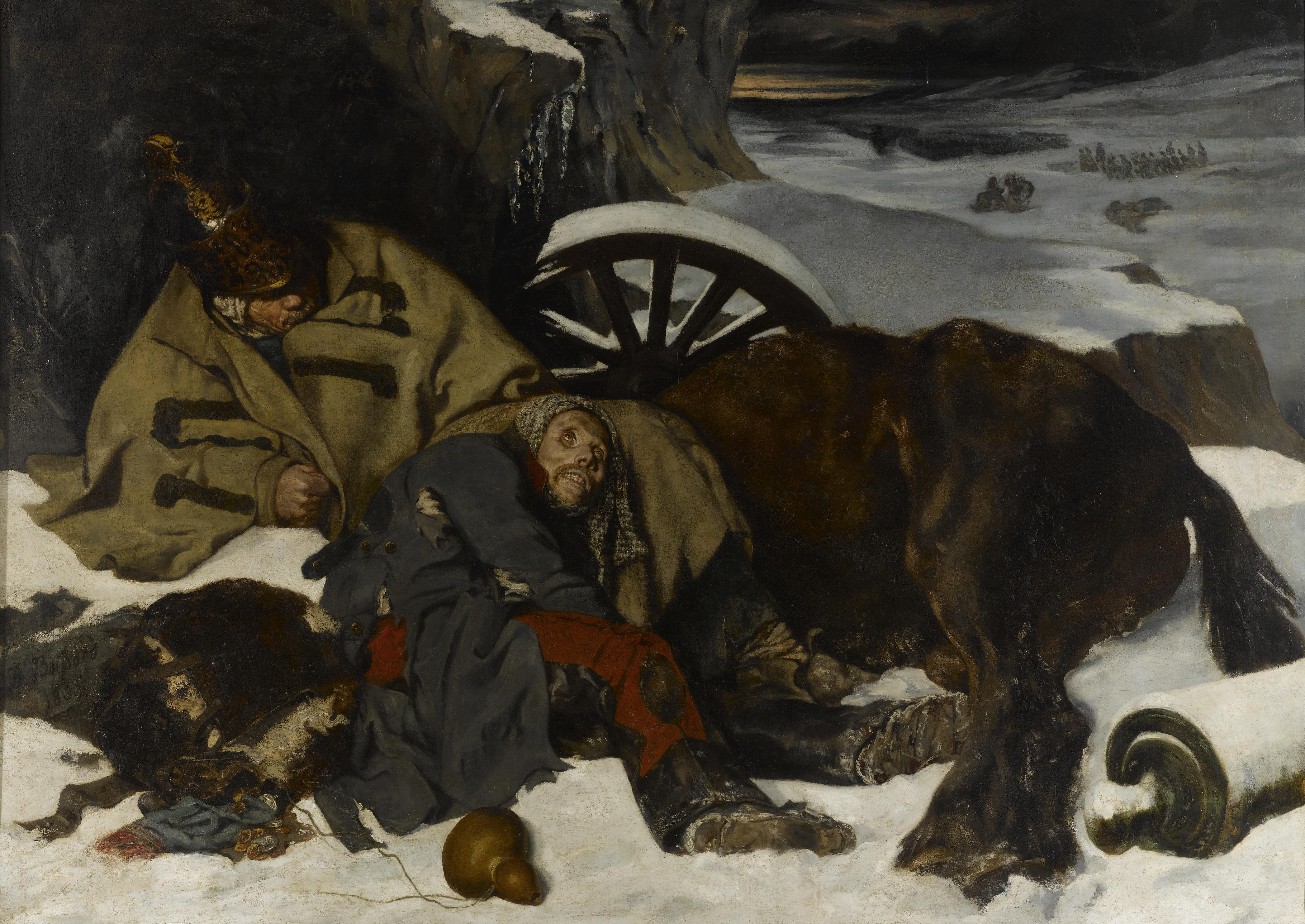 Épisode de la retraite de Russie